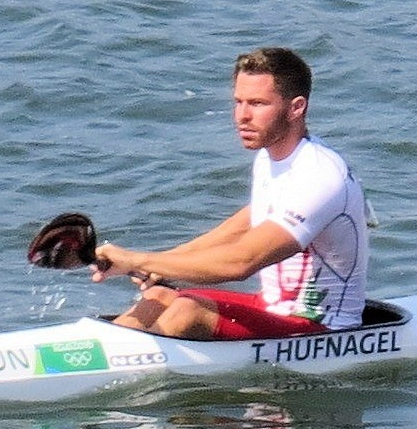 Sx50